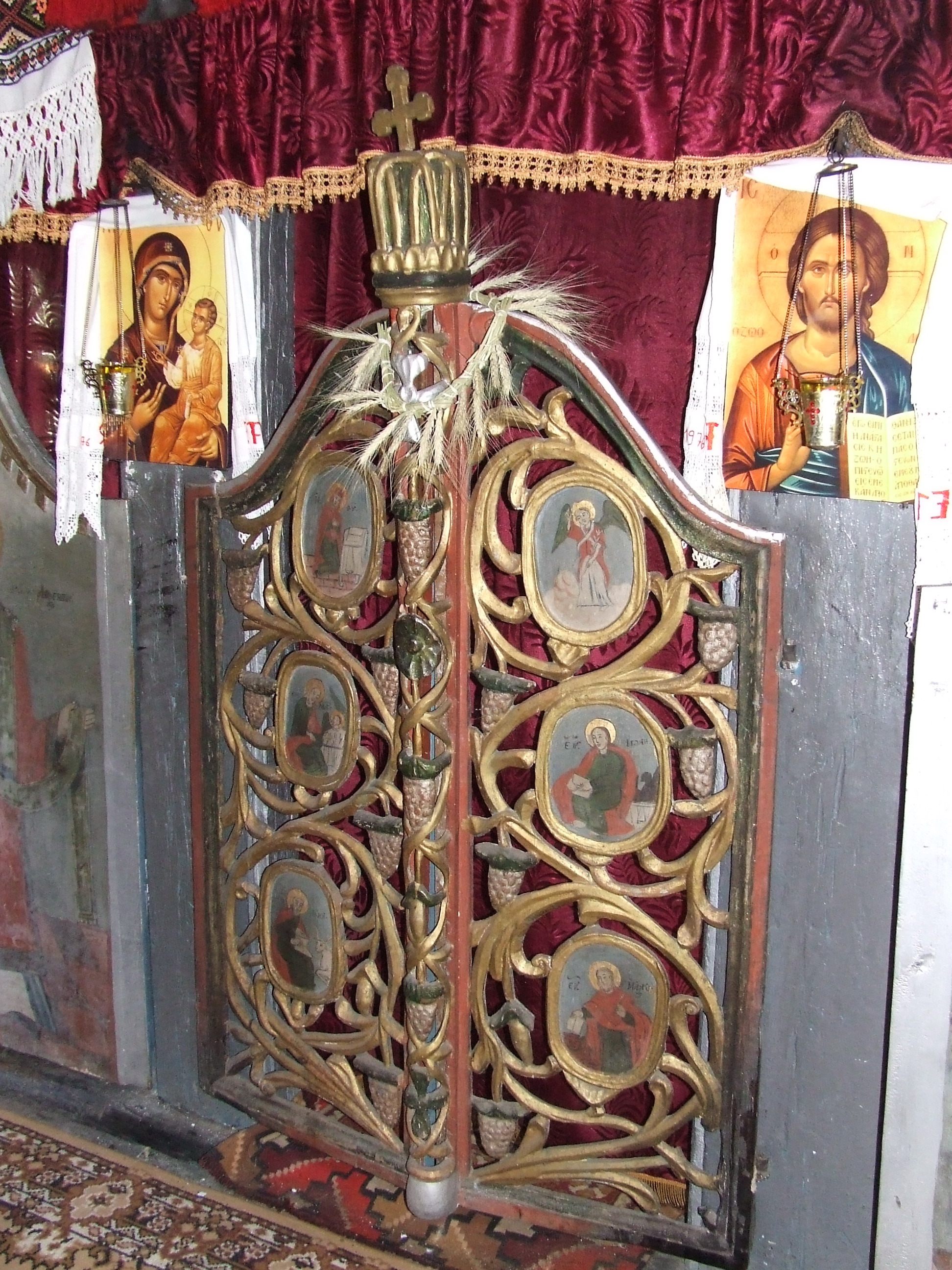 Uşile împărăteşti. Biserica de lemn din Mierţa.